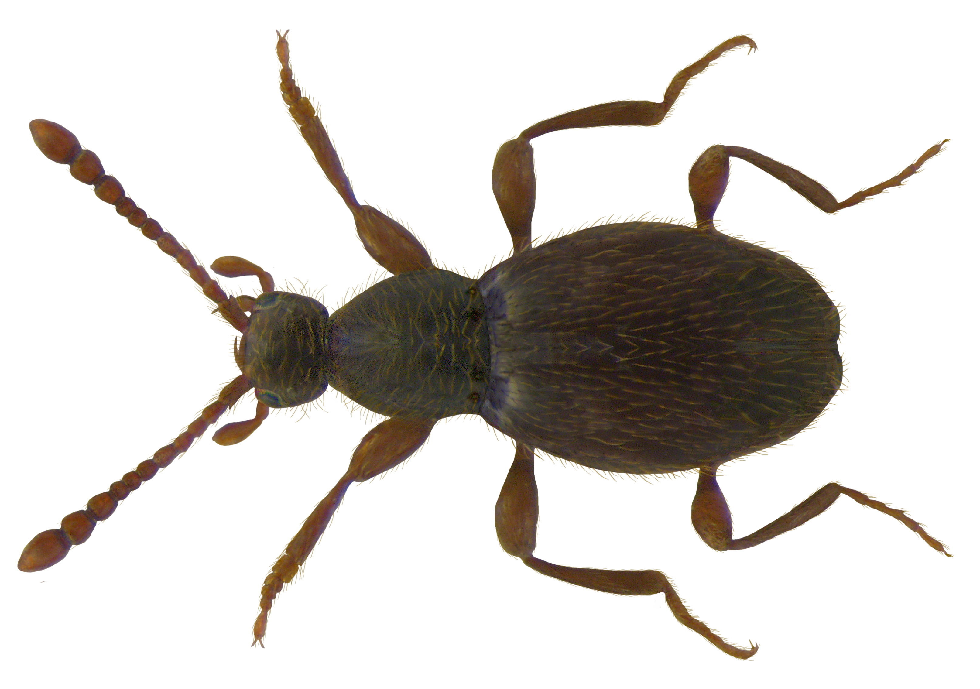 Familie: Scydmaenidae Grösse: 2,0-2,1 mm Verbreitung: Europa, Kanaren, Vorderasien Ökologie: in faulenden Pflanzenresten Fundort: Germania Bayern, Oberfranken, Selbitz leg.det. U.Schmidt, 2000 Foto: U.Schmidt, 2009